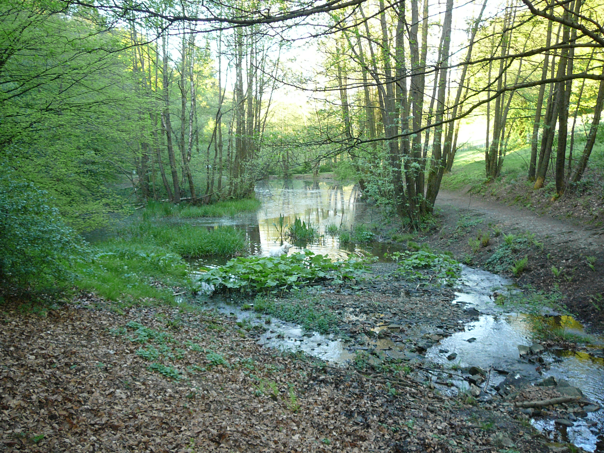 Adolf-Vorwerk-Straße, Wuppertal